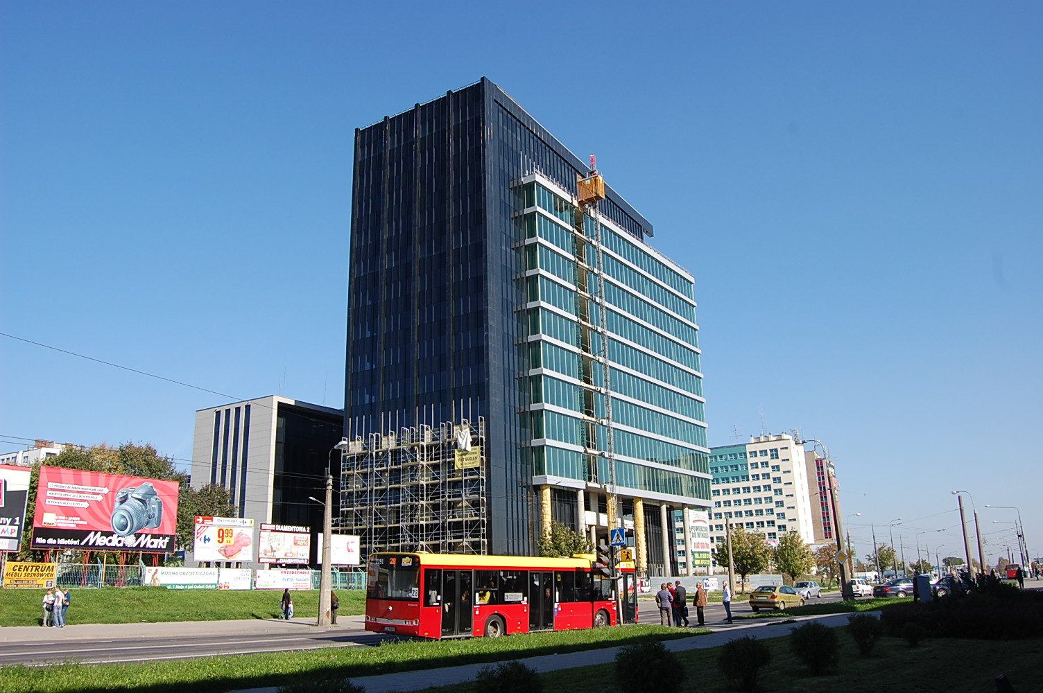 Lublin, ul T. Zana, wieżowiec Gray Office Park w budowie.